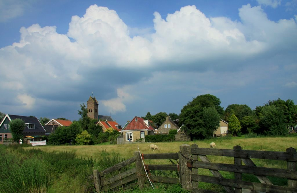 Dearsum een terp dorp achter de dijk van de voormalige Middelzee. Met een zeer bezienswaardige kerk uit omstreeks 1200! gewijd aan Sint Pieter. In 1959 had Dearsum nog 218 inwoners en in 2009 nog maar 131. het dorp ligt prachtig in het Friese land in de gemeente Boarnsterhim. Je vraagt je af was hier vroeger een bakker een kruidenier, ik kan het aan niemand vragen het rustig en stil op straat in Dearsum.